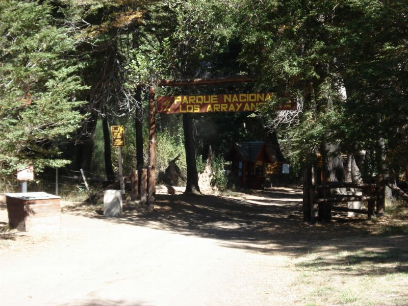 Entrada al Parque Nacional Los Arrayanes, en la península Quetrihue en Villa La Angostura, Neuquen.